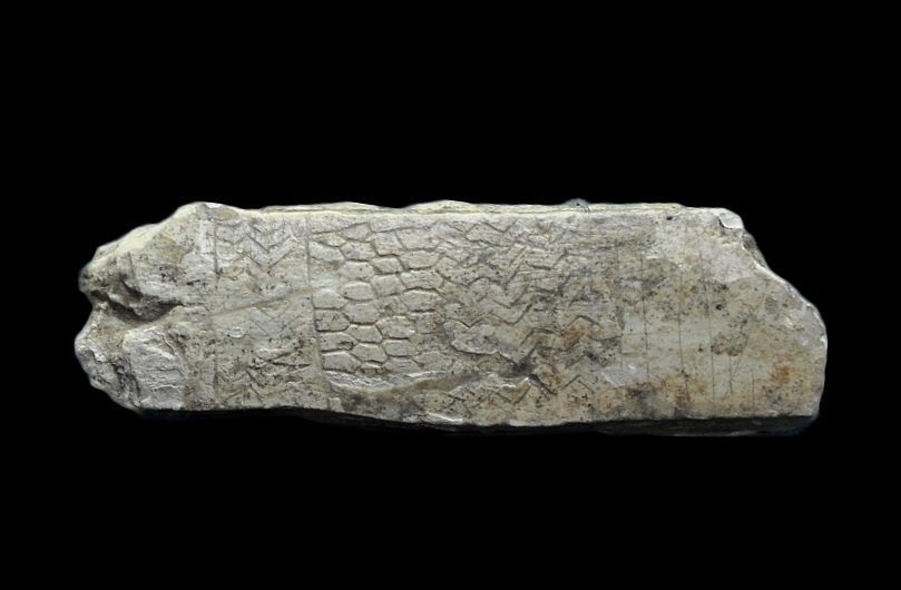 Чурынга. Палеаліт. Костка. Стаянка ля вёскі Юравічы Калінкавіцкага раёна Гомельскай вобласці. Раскопкі У.Дз. Будзько.